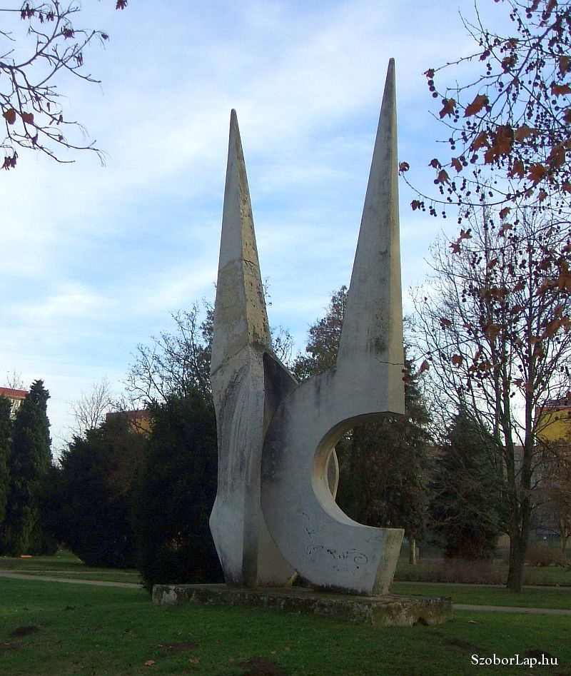 A Párbeszéd című betonszobor a pécsi Uránvárosban. Issei Amemiya alkotása 1978-ból